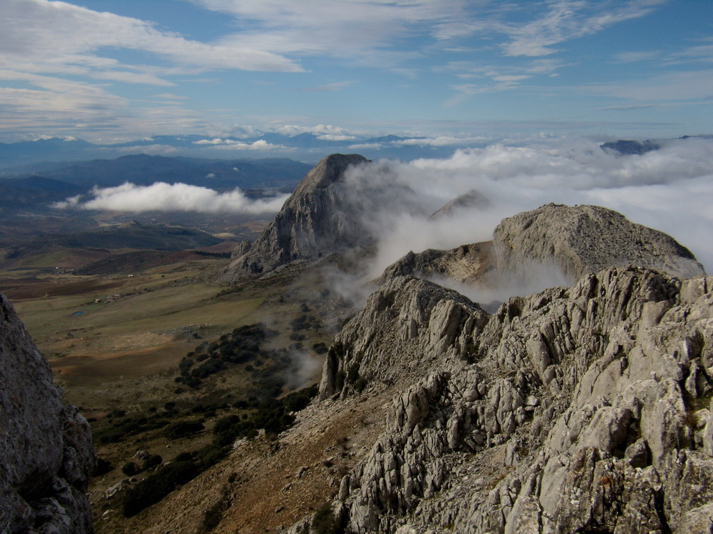 Sierra del Co